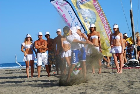 Takmicari u nadmetanju na plazi